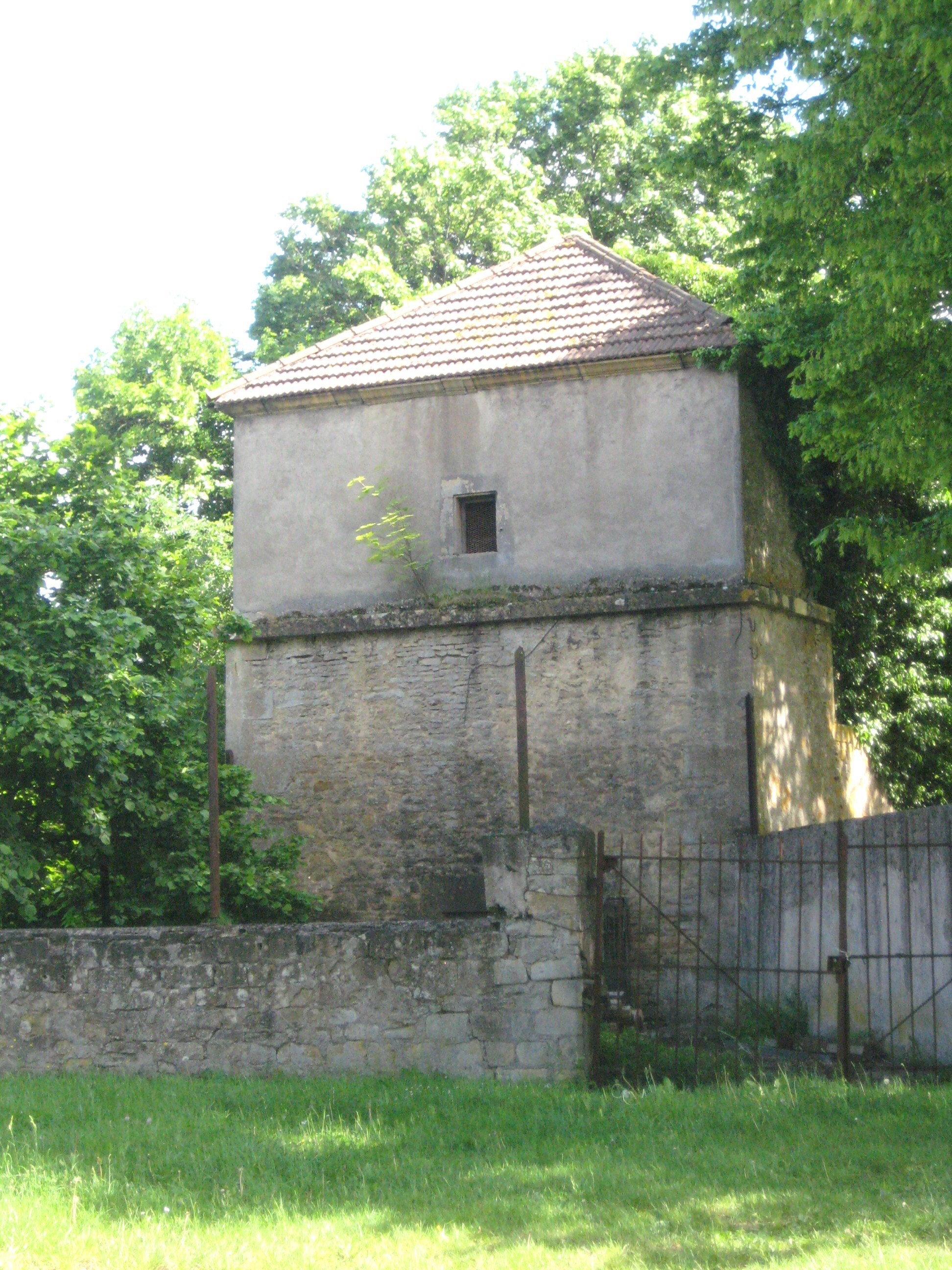 Description Tour du colombier de Montois la Montagne Date22 May 2009Sourcemon appareil photoAuthorAimelaime Tour du colombier de Montois la Montagne